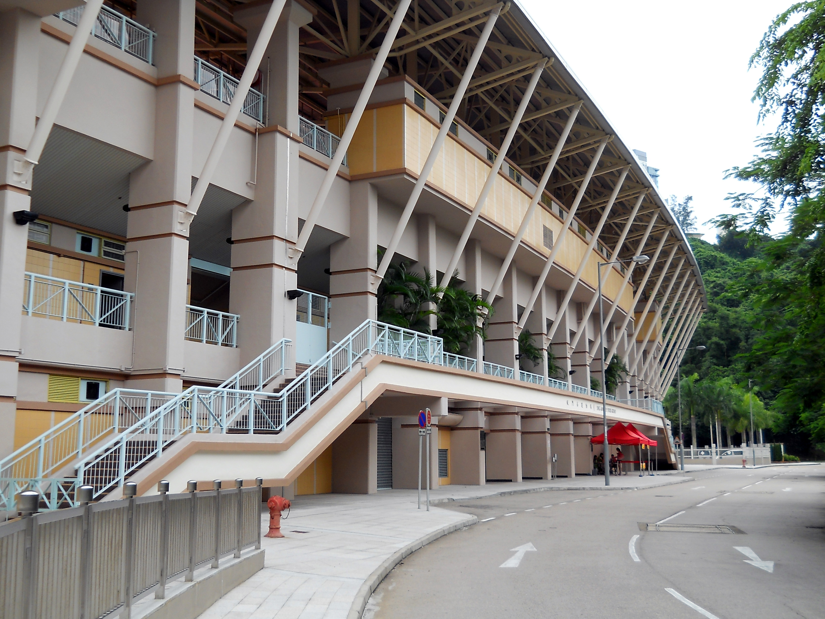 中文（香港）: 城門谷運動場外觀